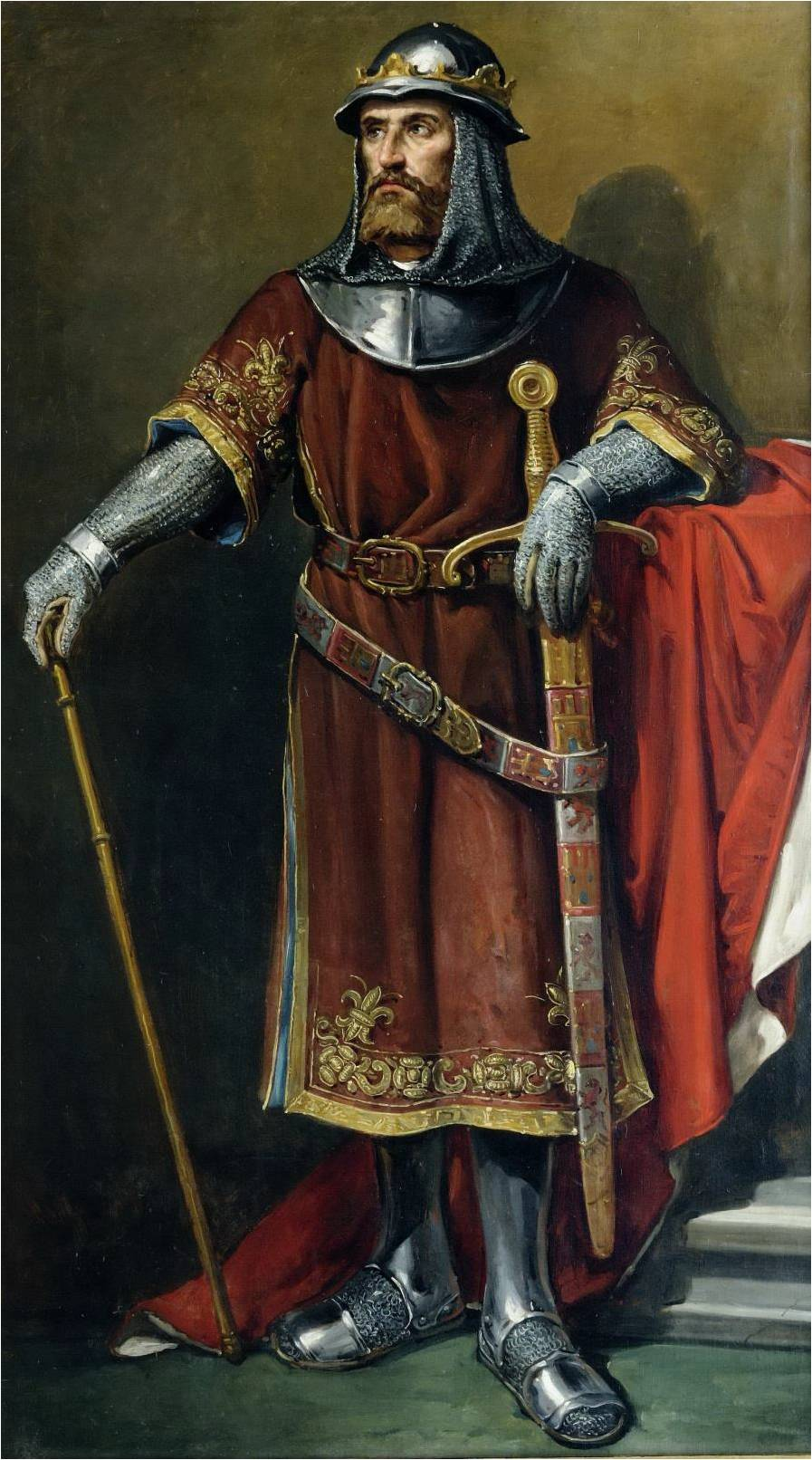 Retrato imaginario del rey Sancho IV de Castilla (1258-1284). Fue hijo del rey Alfonso X de Castilla y de la reina Violante de Aragón. Falleció en Toledo en 1295, a los 36 años de edad y tras haber reinado durante 11 años, y fue sepultado en la catedral de Toledo. Fue sucedido por su hijo, Fernando IV de Castilla.